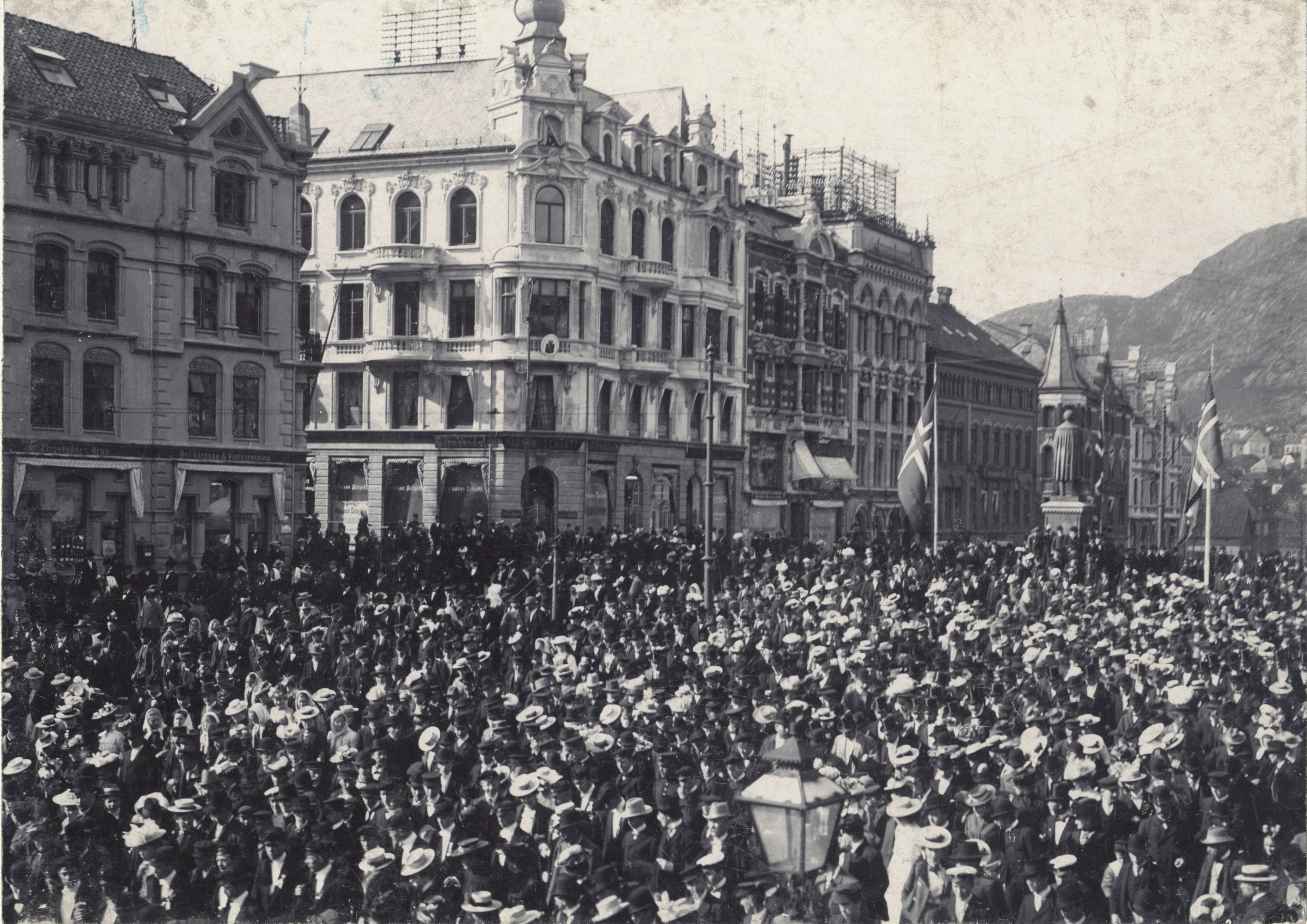 Torgallmenning, Torgalmenningen, Hordaland Torvalmenningen . Folkemasser samlet på torvet.